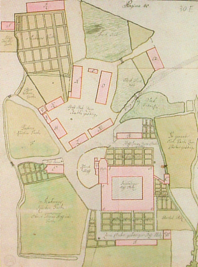 Kloster Mariensee 1740